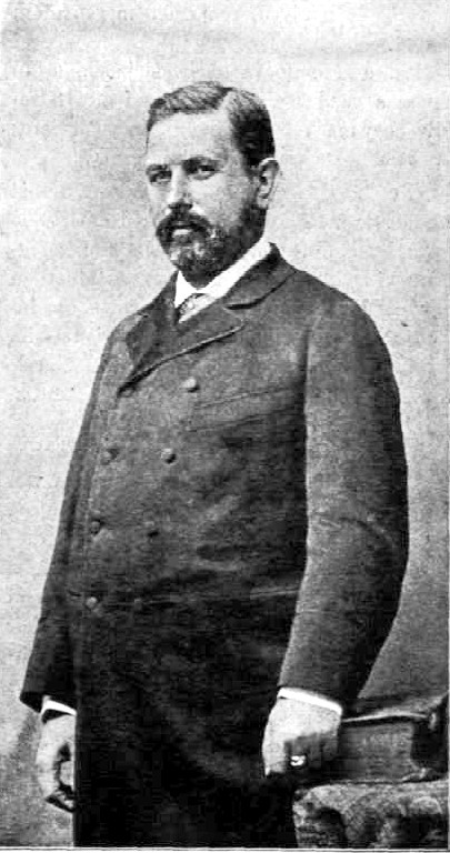 Hieronymi Károly (1836–1911) mérnök, politikus, miniszter portréja. Ellinger Ede fényképfelvétele